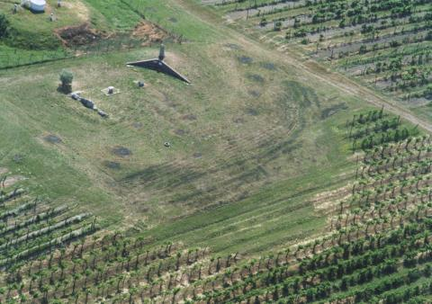 Balatonszabadi.